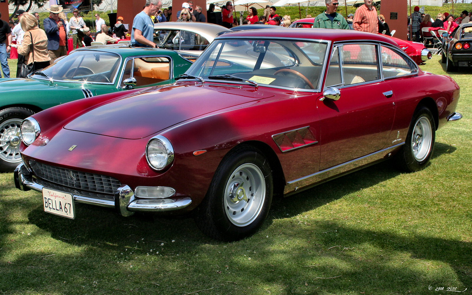 Spanish Landing Park Bella Italian 2008 1967 Ferrari 330 GT 2+2